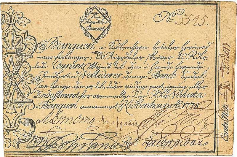 Die 10-Rigsdaler Banknote in Dänemark-Norwegen.